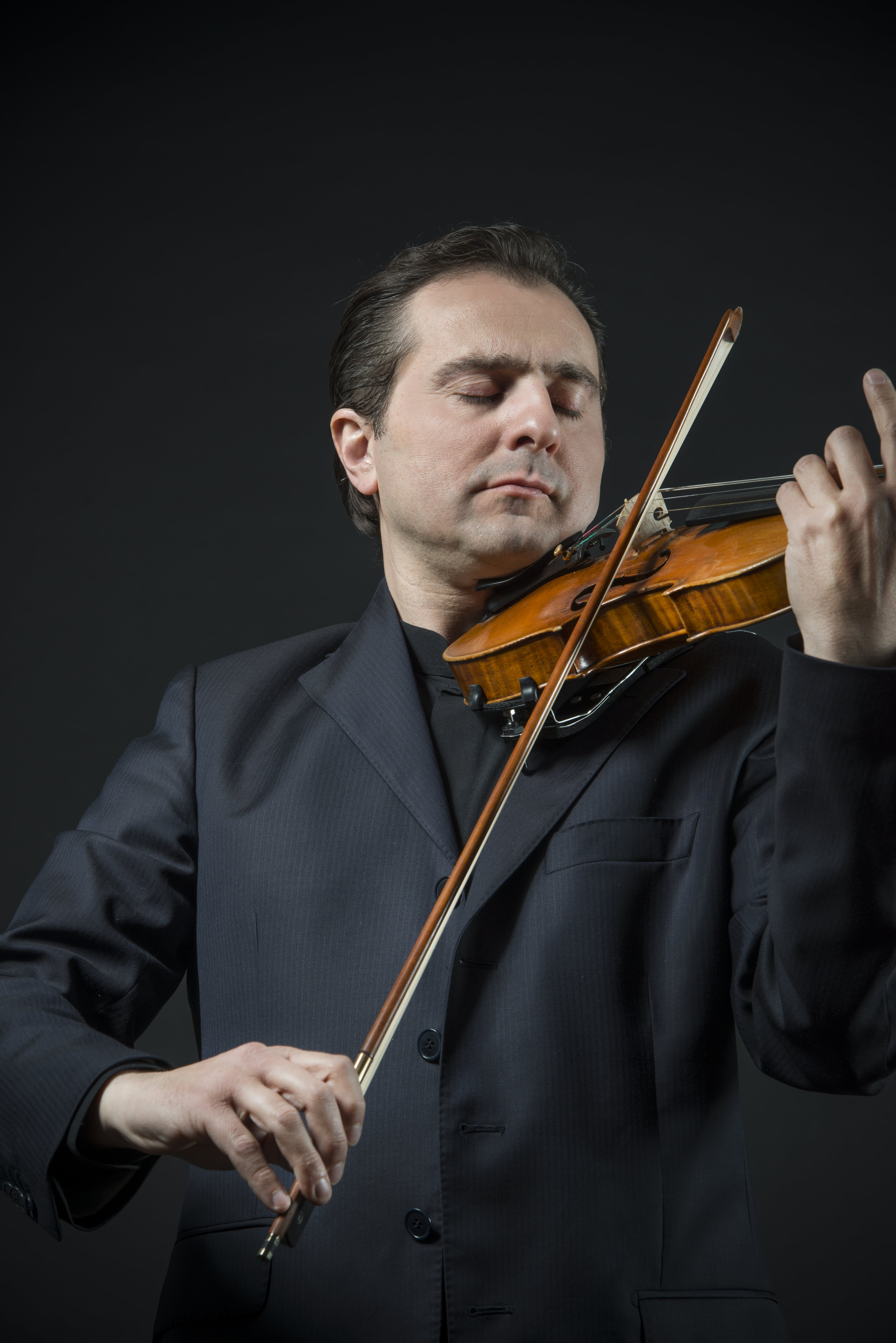 Matteo Fedeli nel 2018